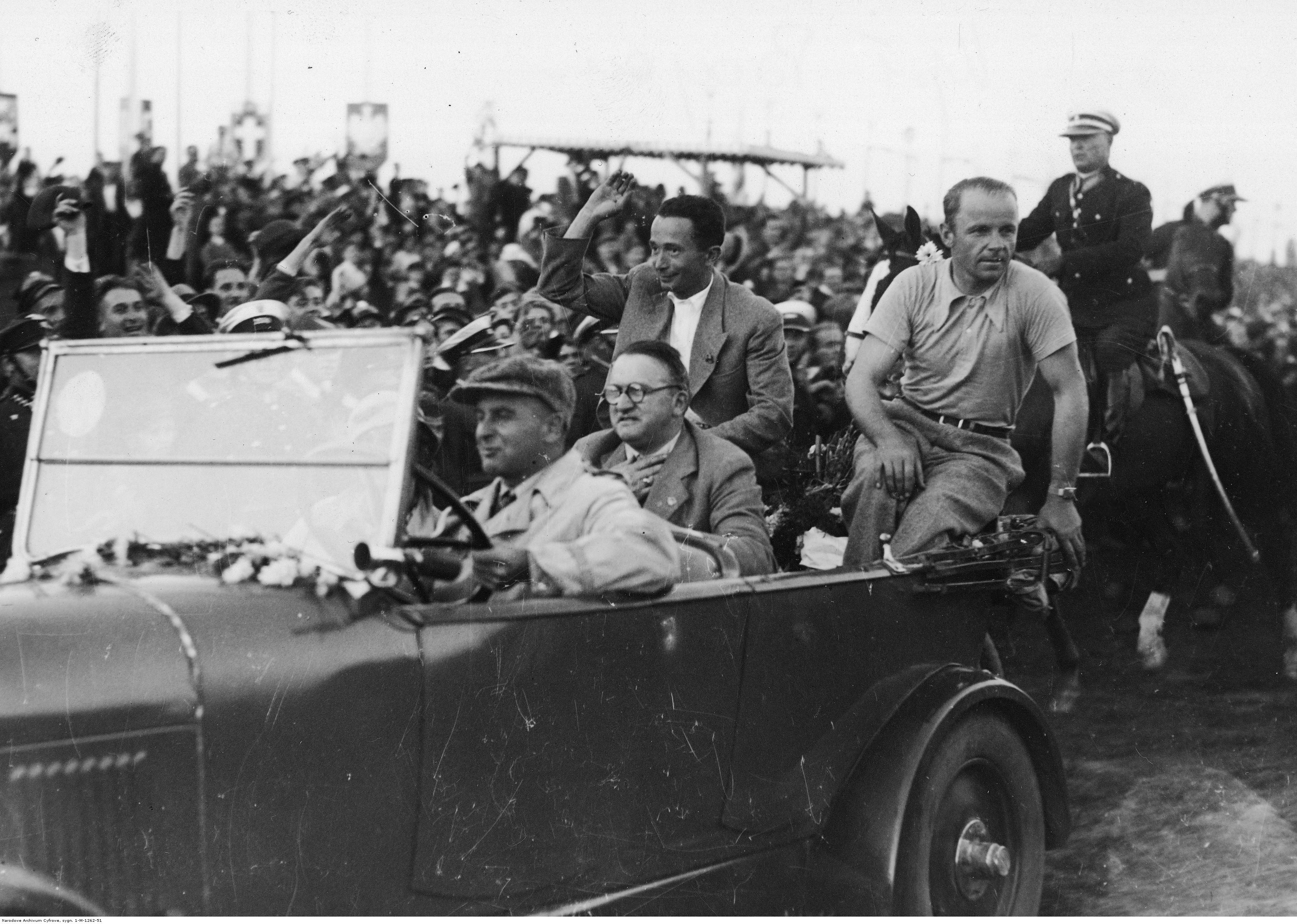 Międzynarodowe Zawody Samolotów Turystycznych (Challenge 1934) w Warszawie. Zwycięzca Międzynarodowych Zawodów Samolotów Turystycznych (Challenge 1934) kapitan pilot Jerzy Bajan (siedzi na samochodzie 1. z lewej) z mechanikiem Gustawem Pokrzywką (siedzi na samochodzie 1. z prawej) w towarzystwie sekretarza generalnego Aeroklubu RP ppłk. Bogdana Kwiecińskiego (w okularach) przejeżdżają w odkrytym samochodzie wzdłuż trybun witani owacyjnie przez publiczność. Za samochodem widoczni policjanci na koniach. Koncern Ilustrowany Kurier Codzienny - Archiwum Ilustracji. Sygnatura: 1-M-1262-51